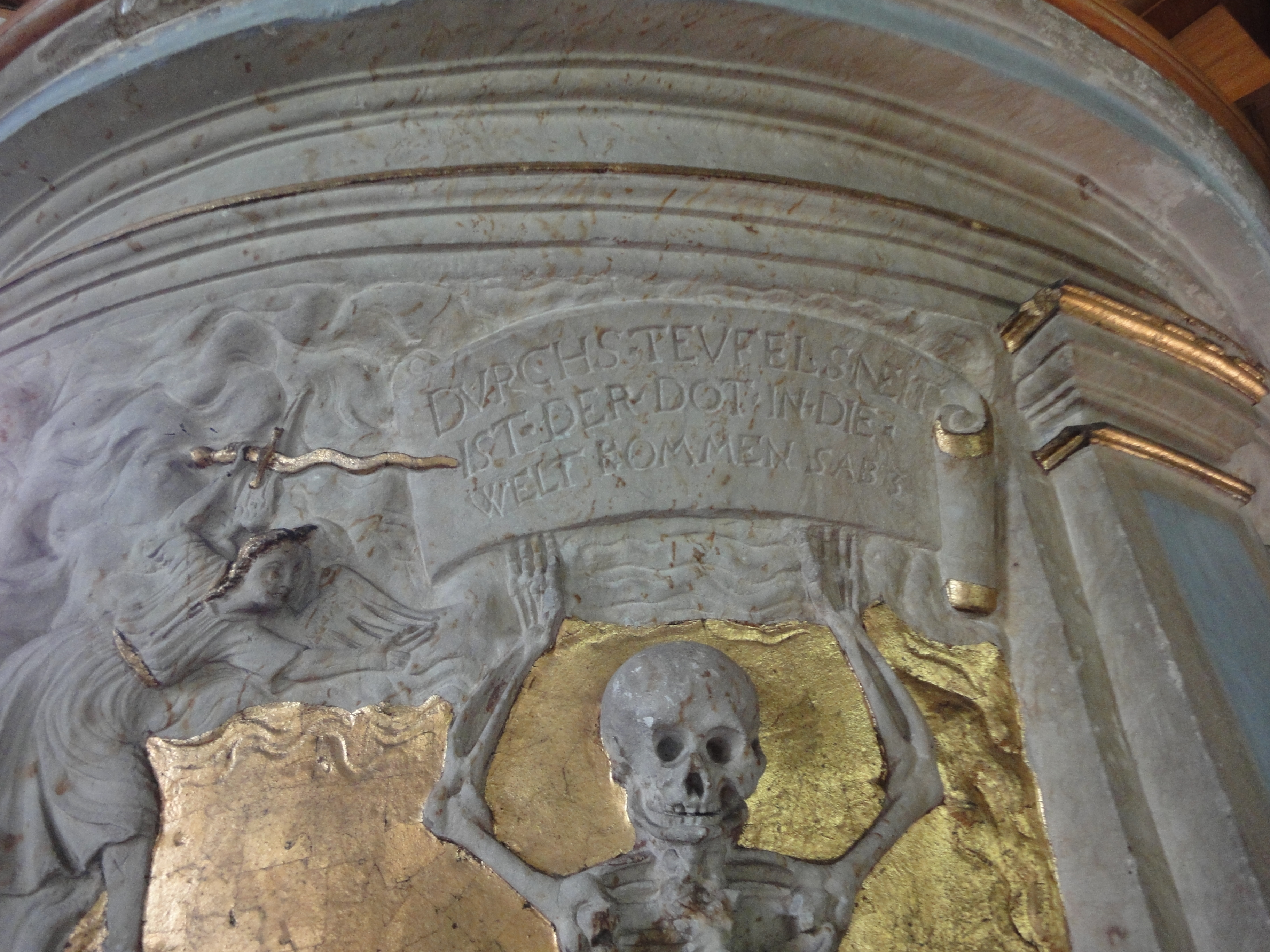 details pulpit